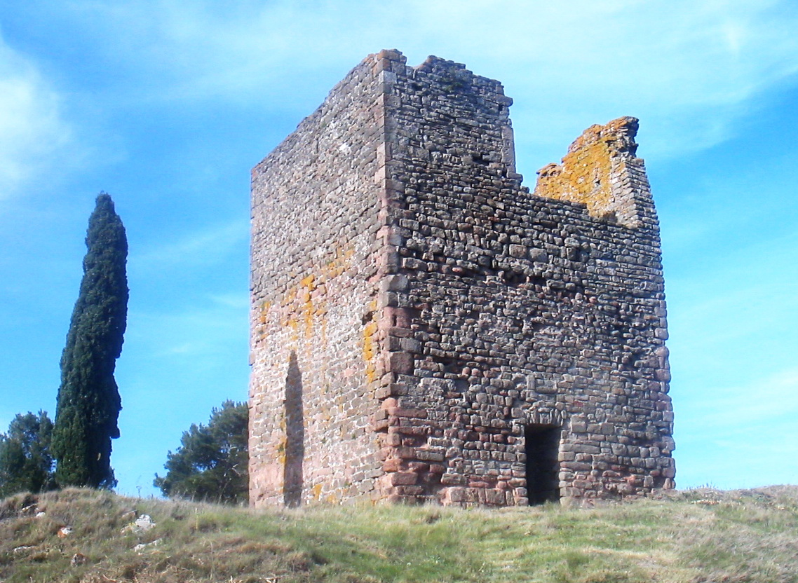 Tour romane à Escales (Aude)